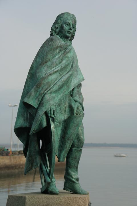 Statue de Pierre Bouguer sur le port du Croisic (ville natale du scientifique). Photo prise le 28/10/2006 par PY. Stucki.